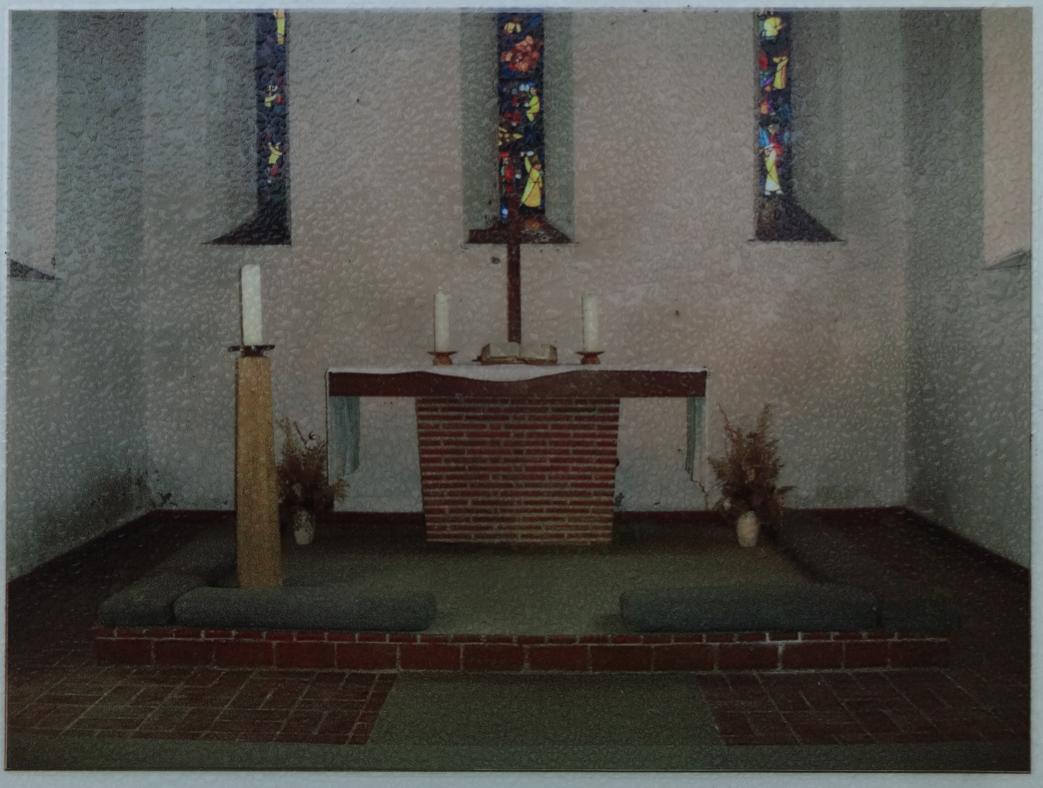 Die Dorfkirche in Obersdorf, einem Ortsteil der Stadt Müncheberg im Landkreis Oder-Spree, entstand in der zweiten Hälfte des 13. Jahrhunderts. Das Bauwerk wurde im Zweiten Weltkrieg stark zerstört und anschließend wiederaufgebaut. Die Aufnahme stammt aus einer öffentlich zugänglichen Informationstafel vor dem Gebäude.